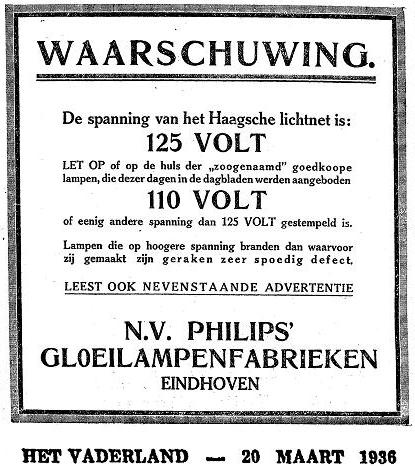 Advertentie die illustreert dat de lichtnetspanning van Den Haag ooit 127 volt was (soms aangeduid als 125 volt). In 1932-1933 schakelde Den Haag over van 120 naar 127 volt, en later in 1956-1966 van 127 naar 220 volt.